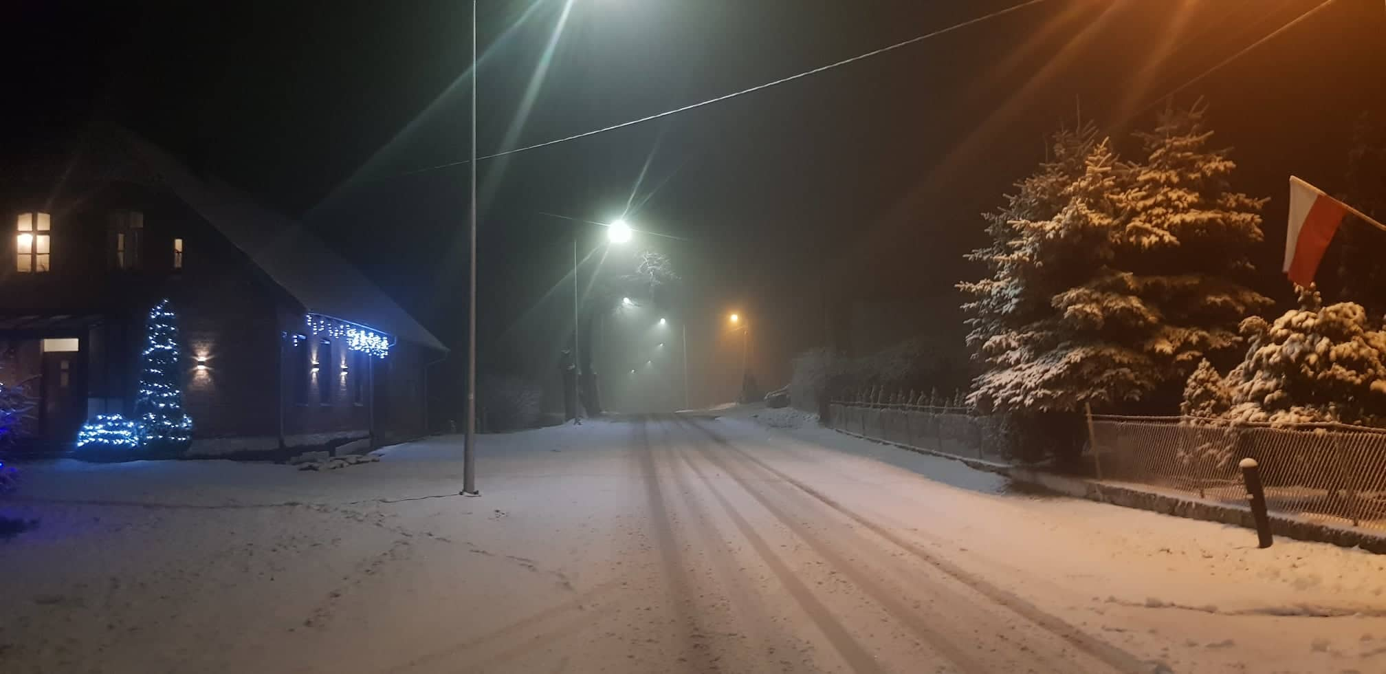 Nowe oświetlenie uliczne w Gronajnach.